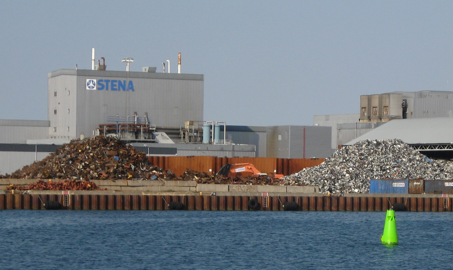 Stena Metall i Malmö hamn